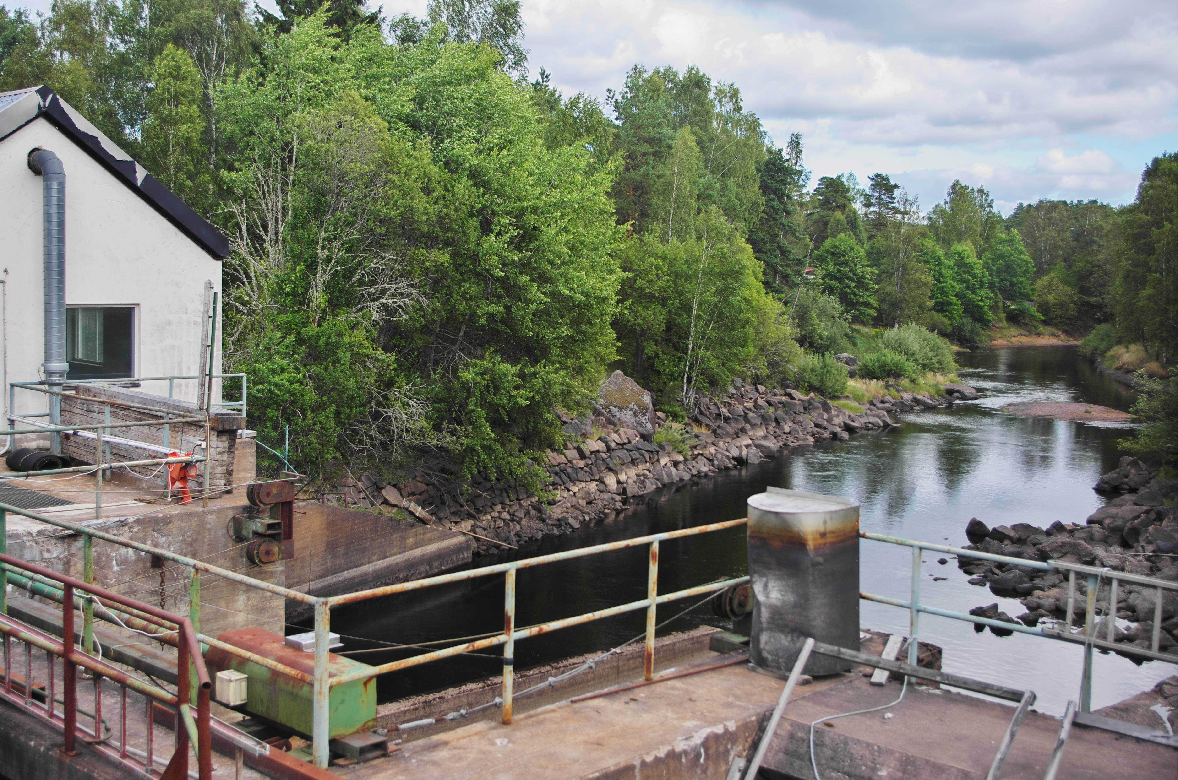 Järnforsens kraftstation i Järnforsen i Hultsfreds kommun i Småland i Sverige. Kraftstationen dämmer sedan 1960-talet upp Emån för elproduktion.